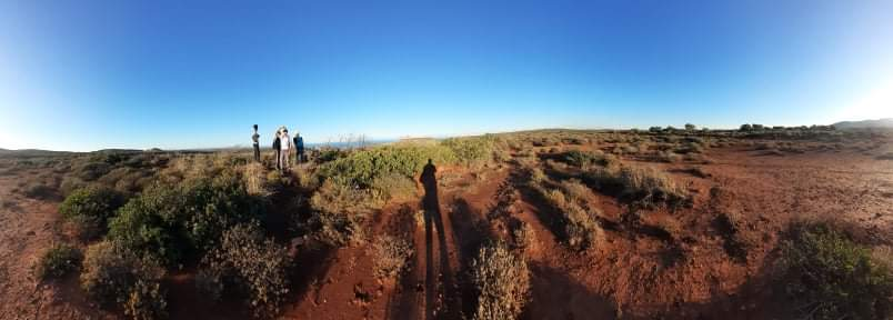 حب لبريا This is an image with the theme "Africa on the Move or Transport" from: Algeria